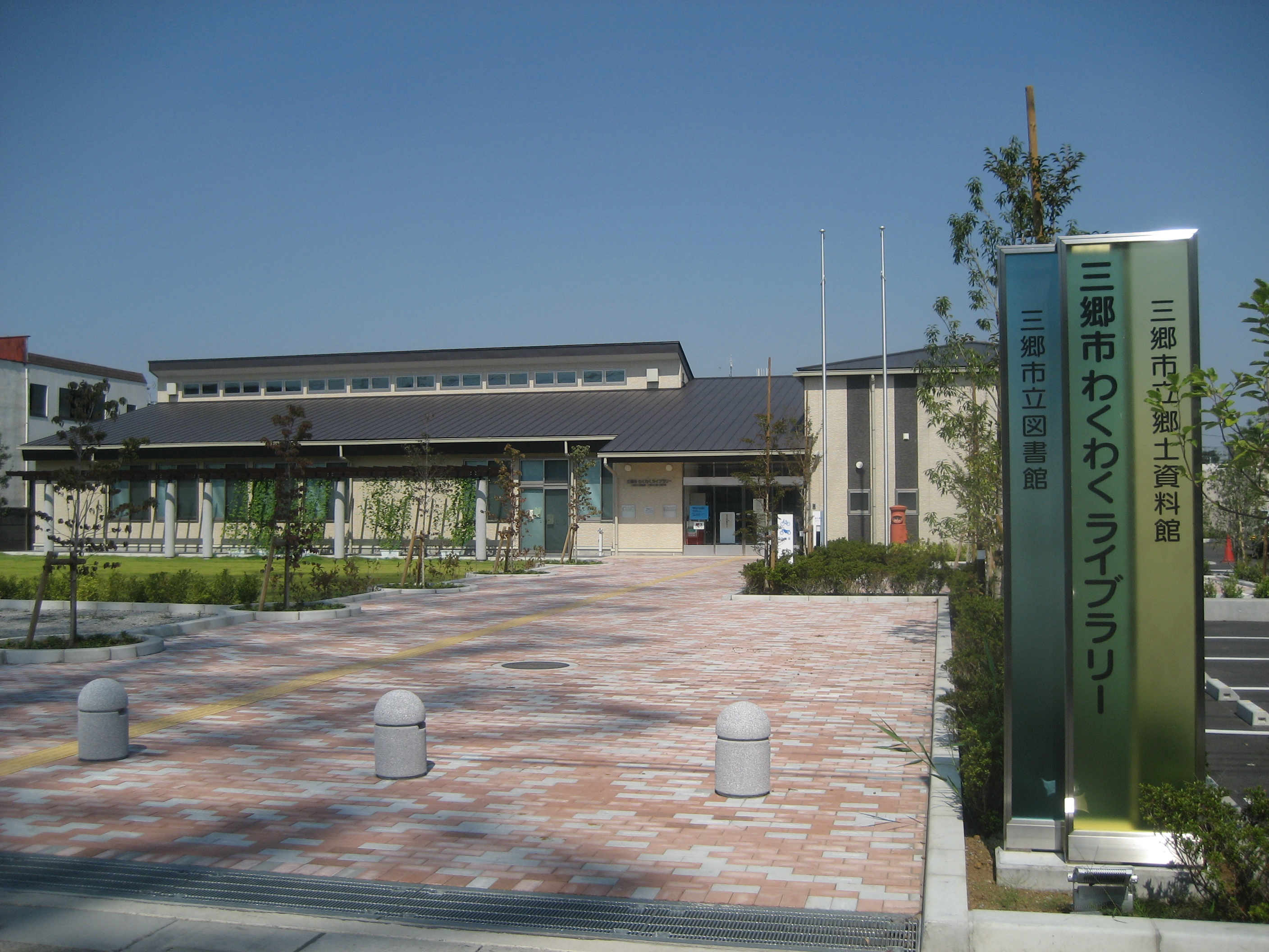 三郷市立図書館・郷土資料館